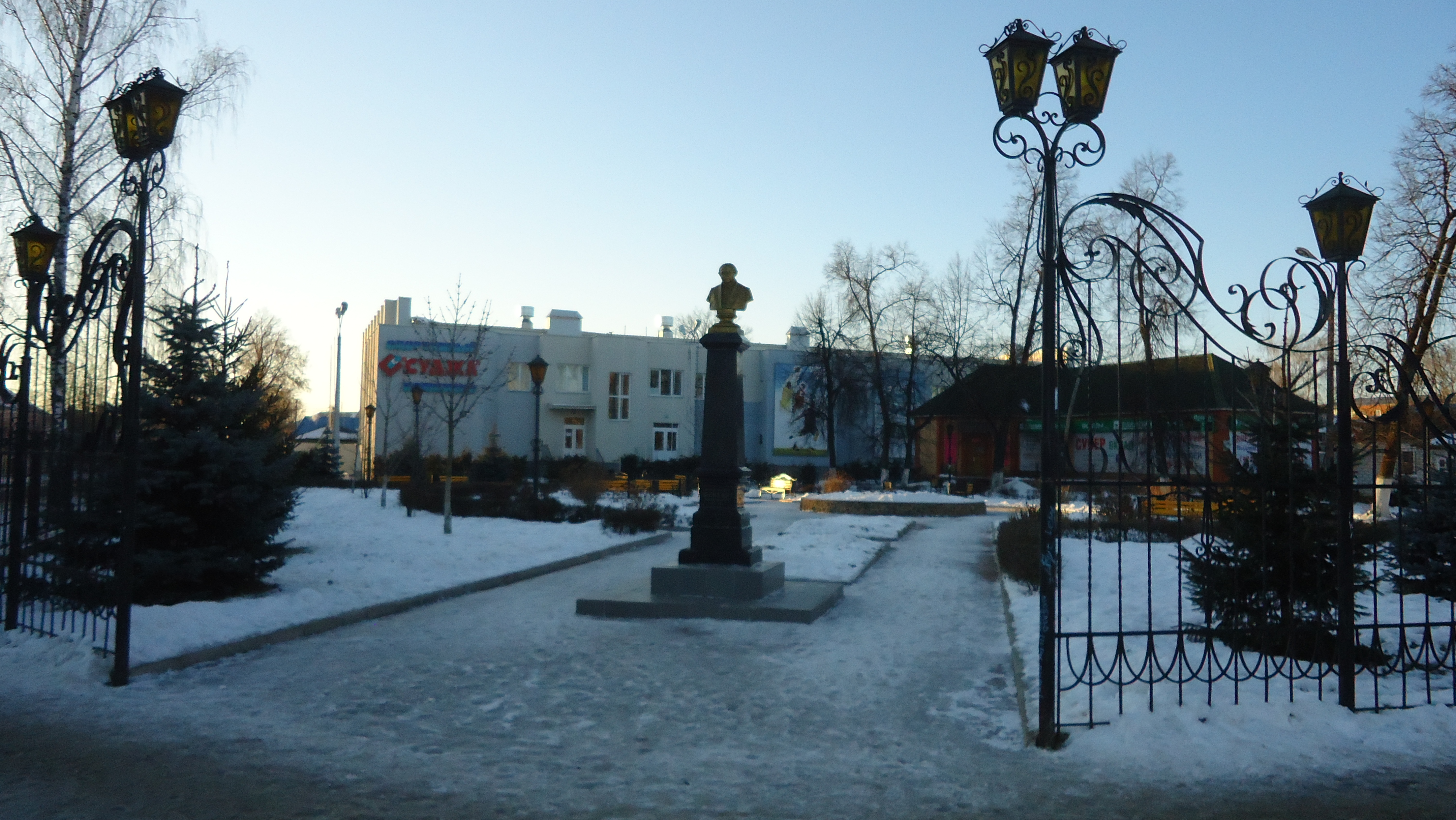 Памятник М.С . Щепкину. Сделал на прогулке Cusik